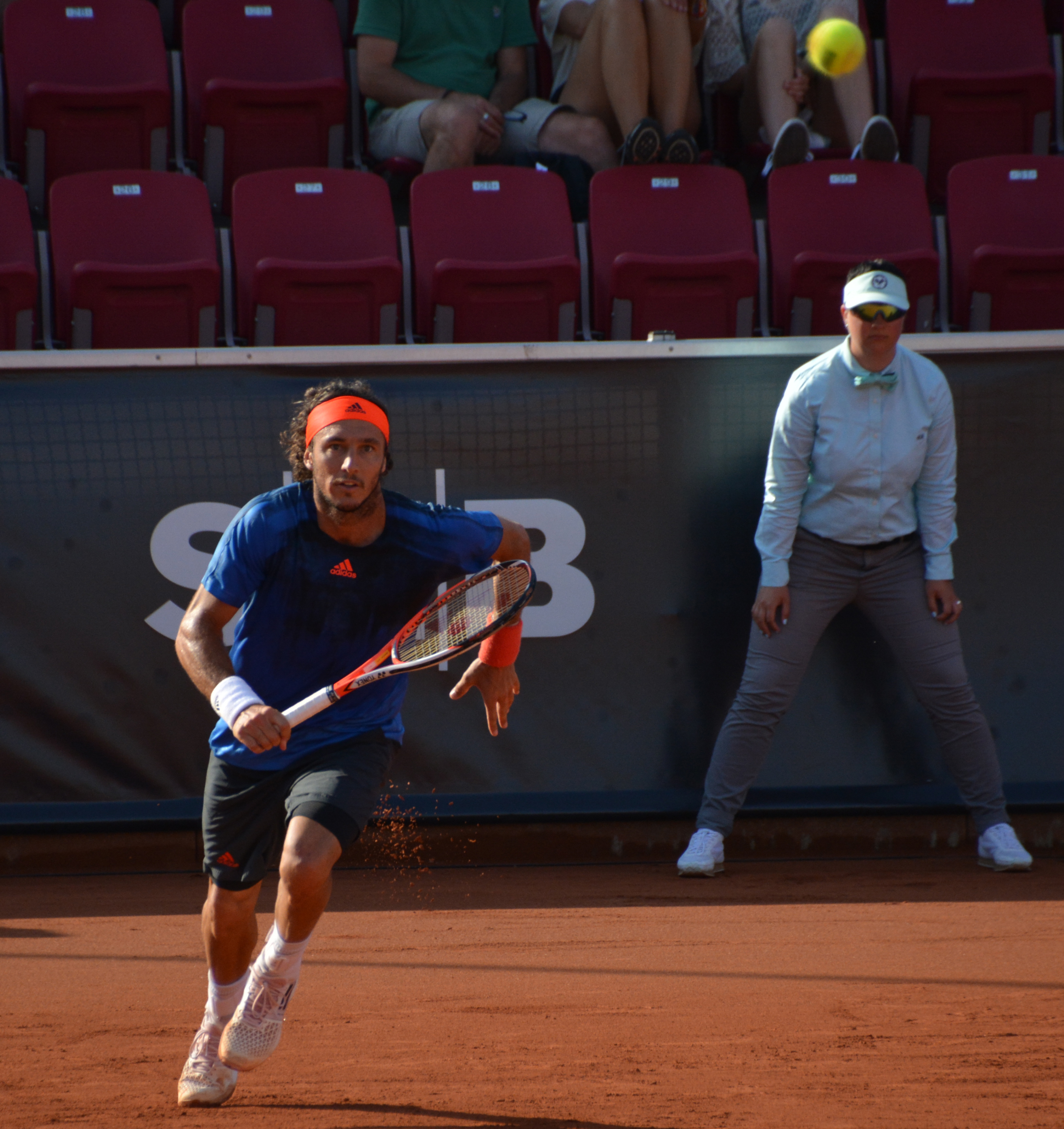 ATP Båstad 2015